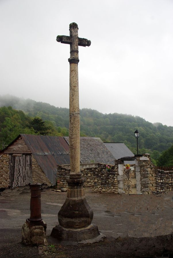 Antras Ariège Croix de marbre sur la place du village (Inscrit, 1950)